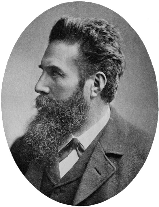 Wilhelm Conrad Röntgen, Discoverer of X-Rays in 1895.